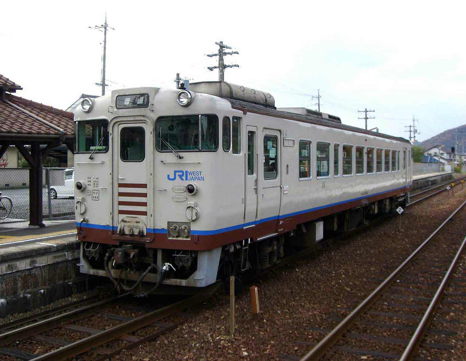 西日本旅客鉄道キハ40形3000番台3003。玉柏駅にて